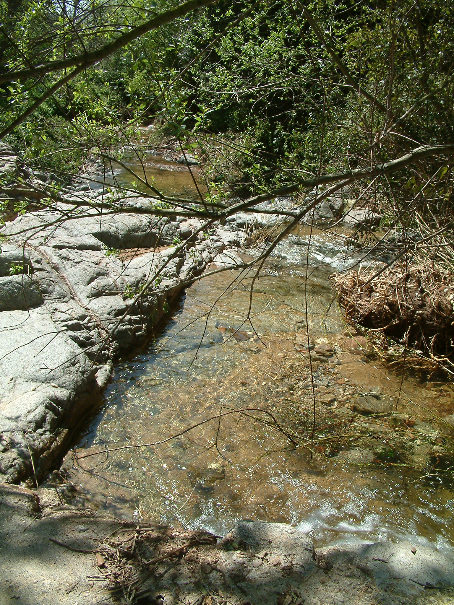 Font de les Creus, a Vilaplana, al Baix Camp